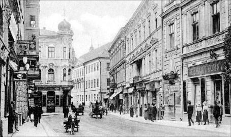 Вулиця Третього Мая, Тернопіль. На задньому плані справа — Перша гімназія.